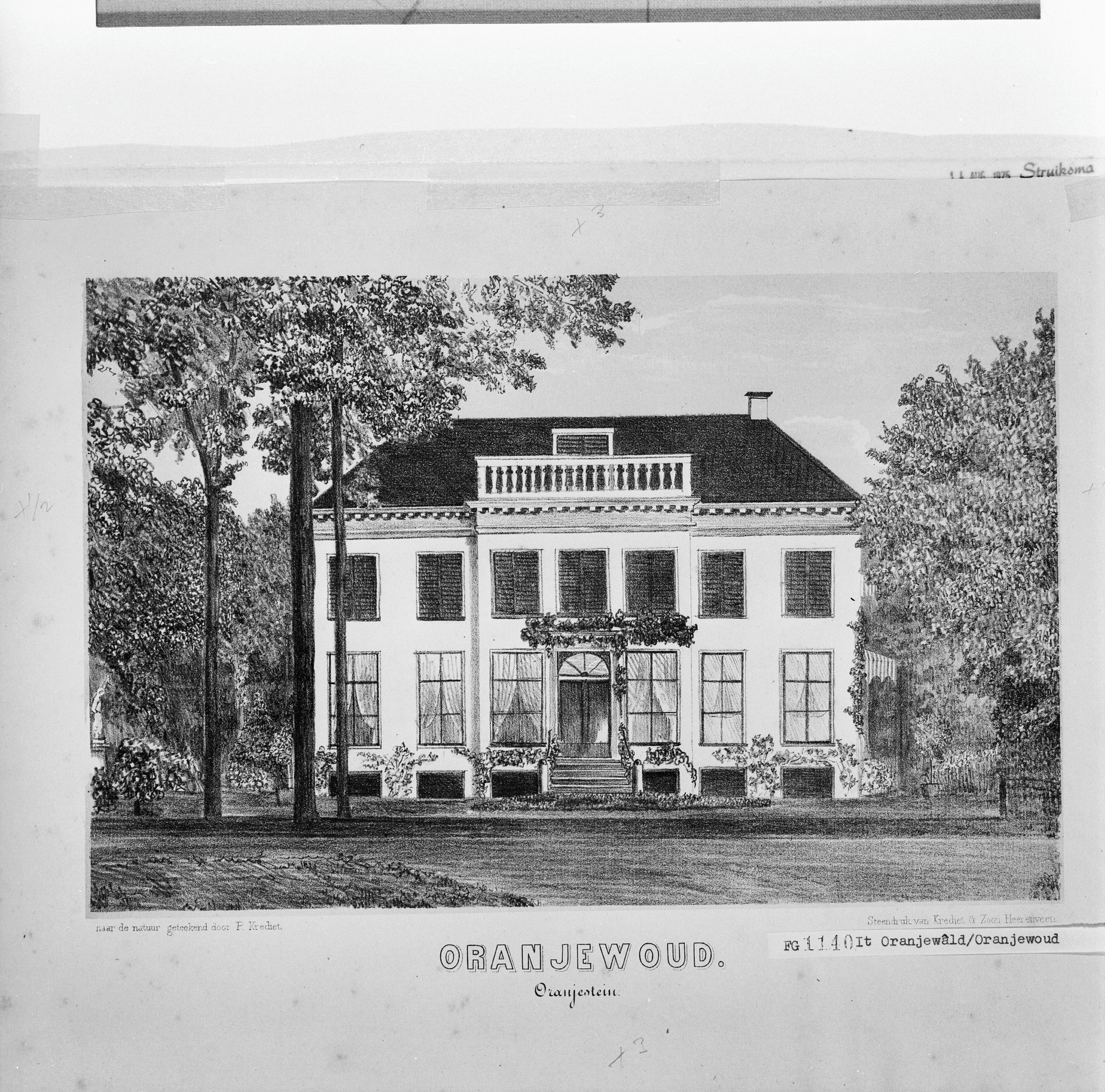 Huis "Oranjestein": reproductie, tekening P. Krediet